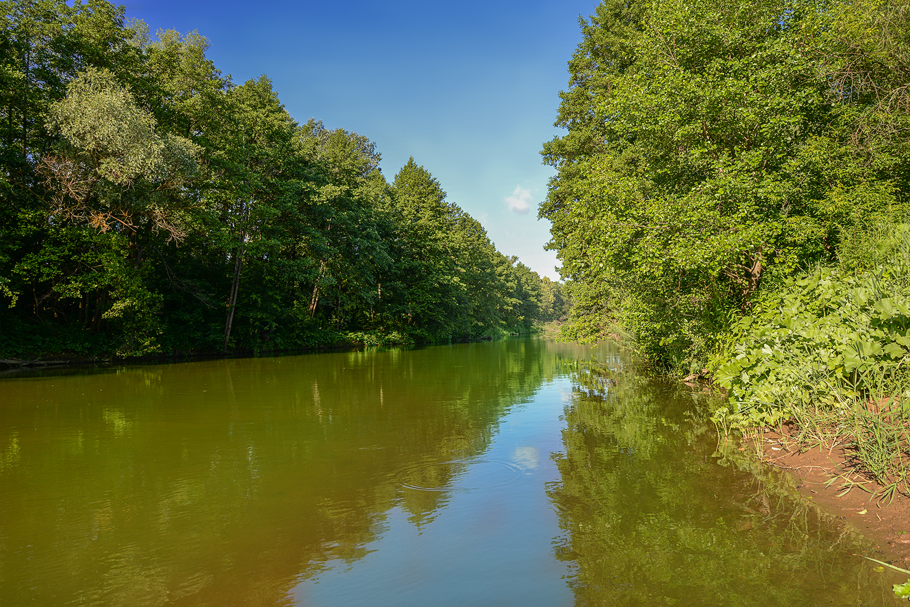 Бузулукский заповедник, Бузулукский район This image is related to the protected area of Russia number 5600017